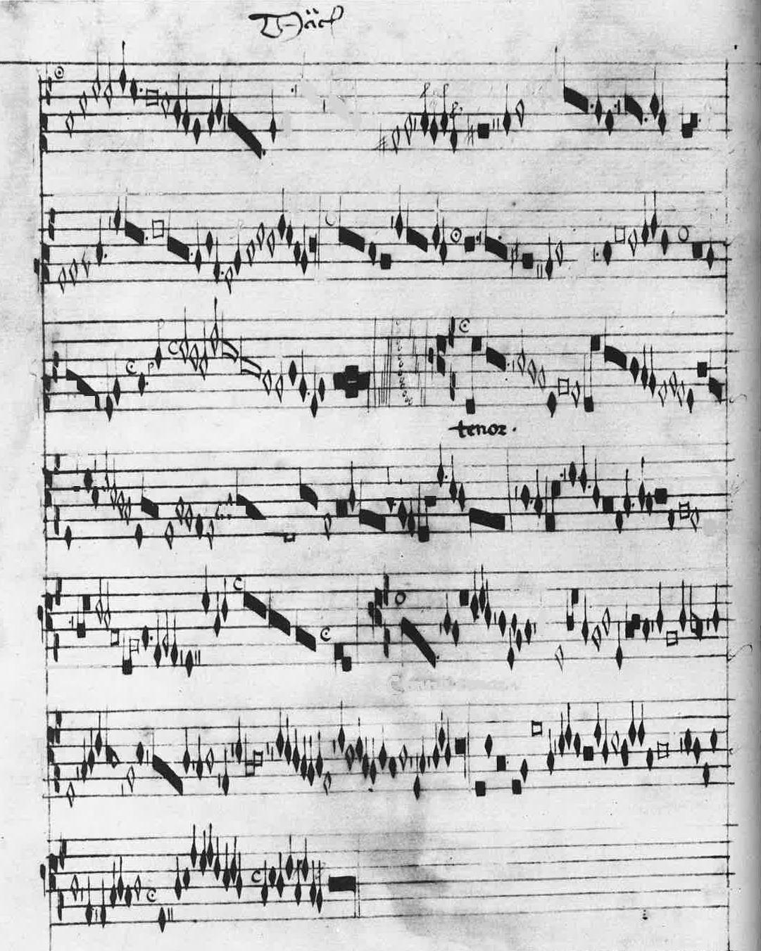 sometimes misattributed to "Marcus?"